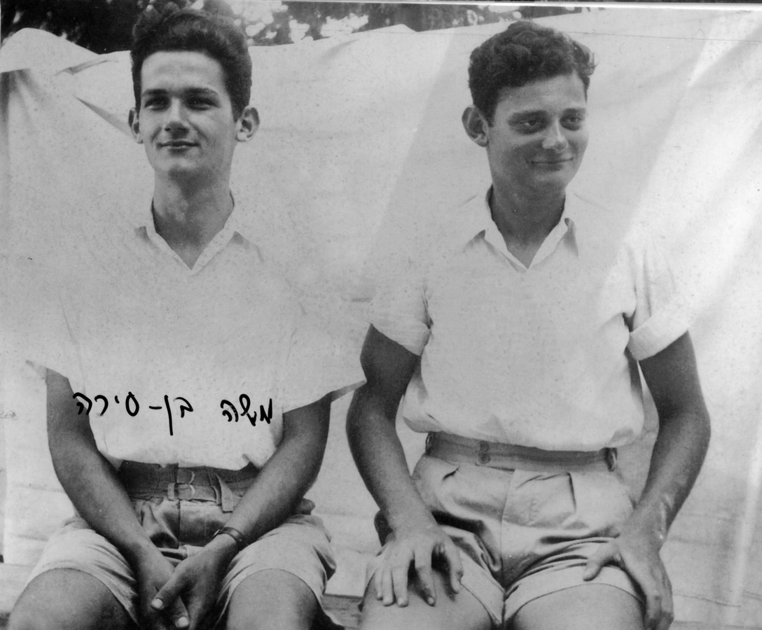 פלוגה ו בגליל ובעמק 1941-1947 - פלוגה ו' 1941 - 1947 - הכשרת גניגר הצופים ג'. משה בן סירה